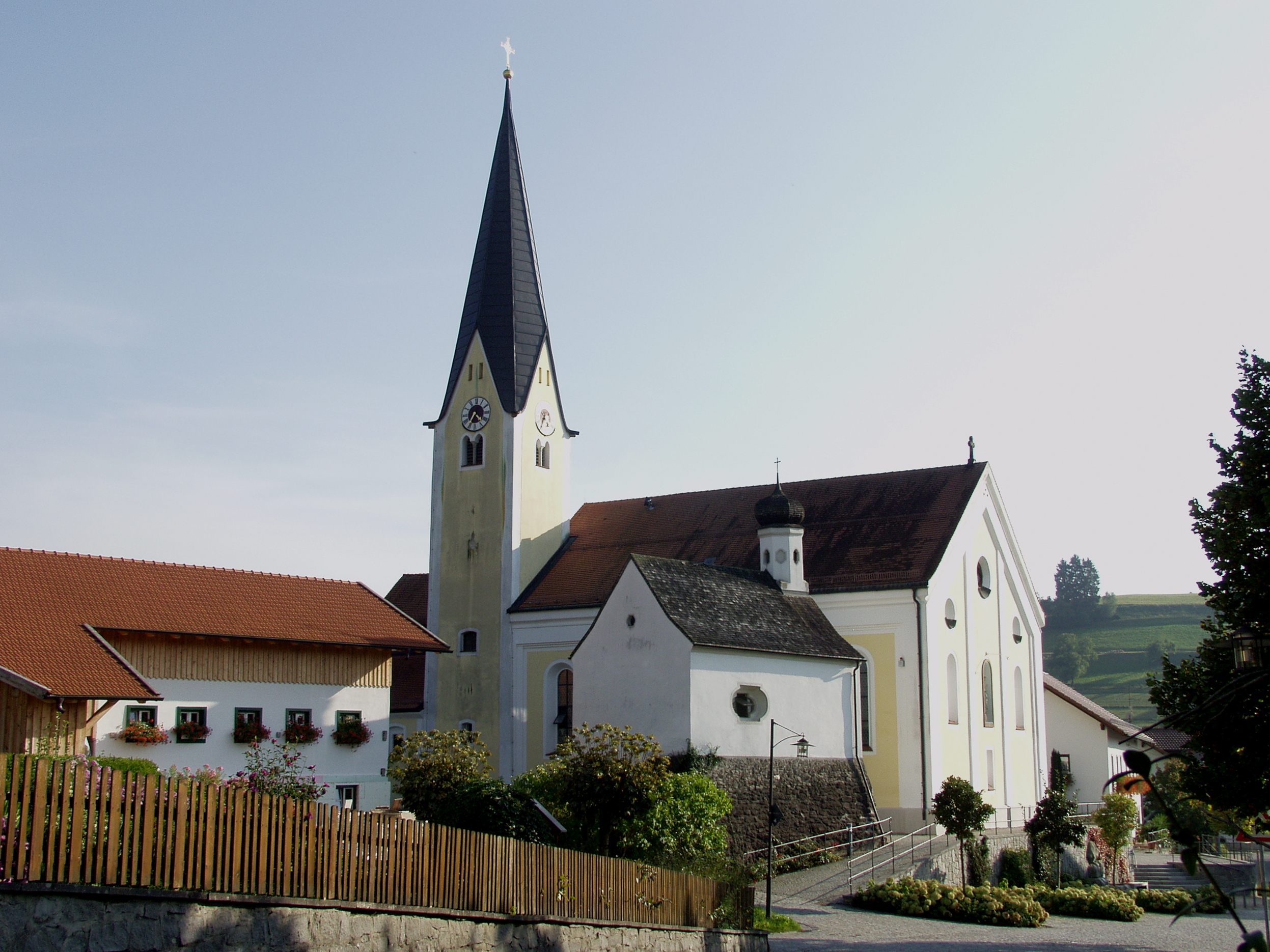 Pfarrkirche Sankt Laurentius Haibach